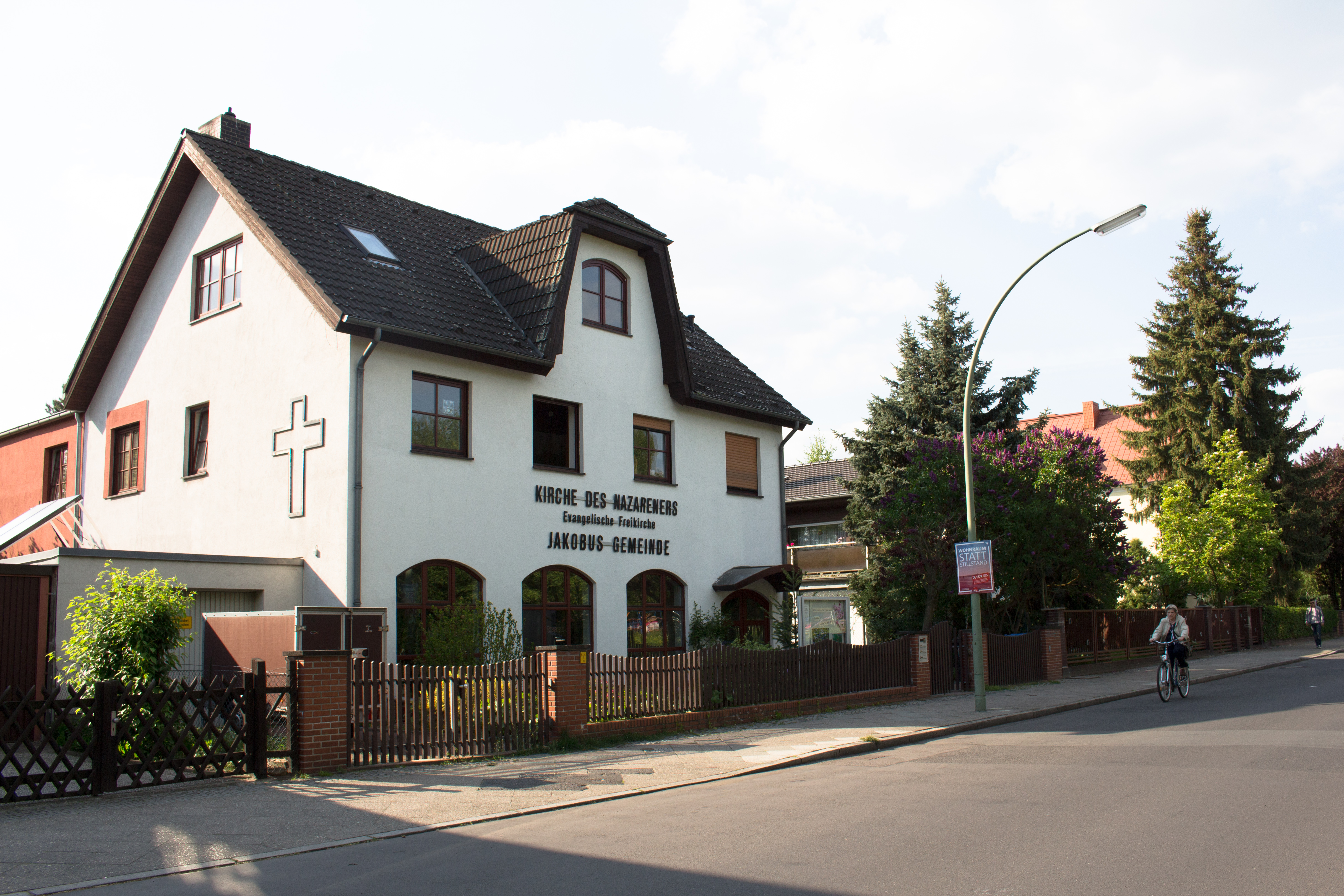 Kirche des Nazareners in der John-Locke-Straße in Berlin-Lichtenrade